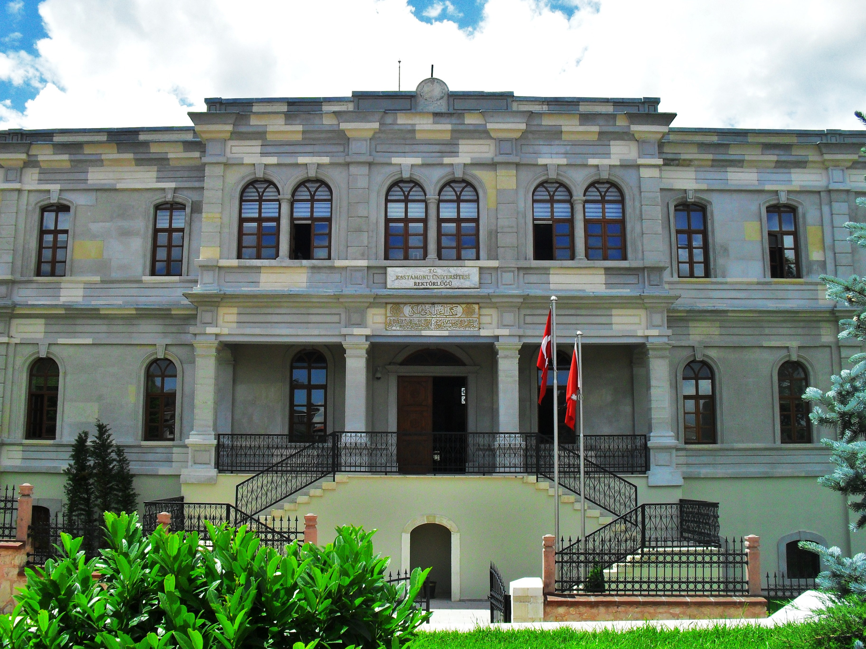 Kastamonu Üniversitesi Rektörlüğü